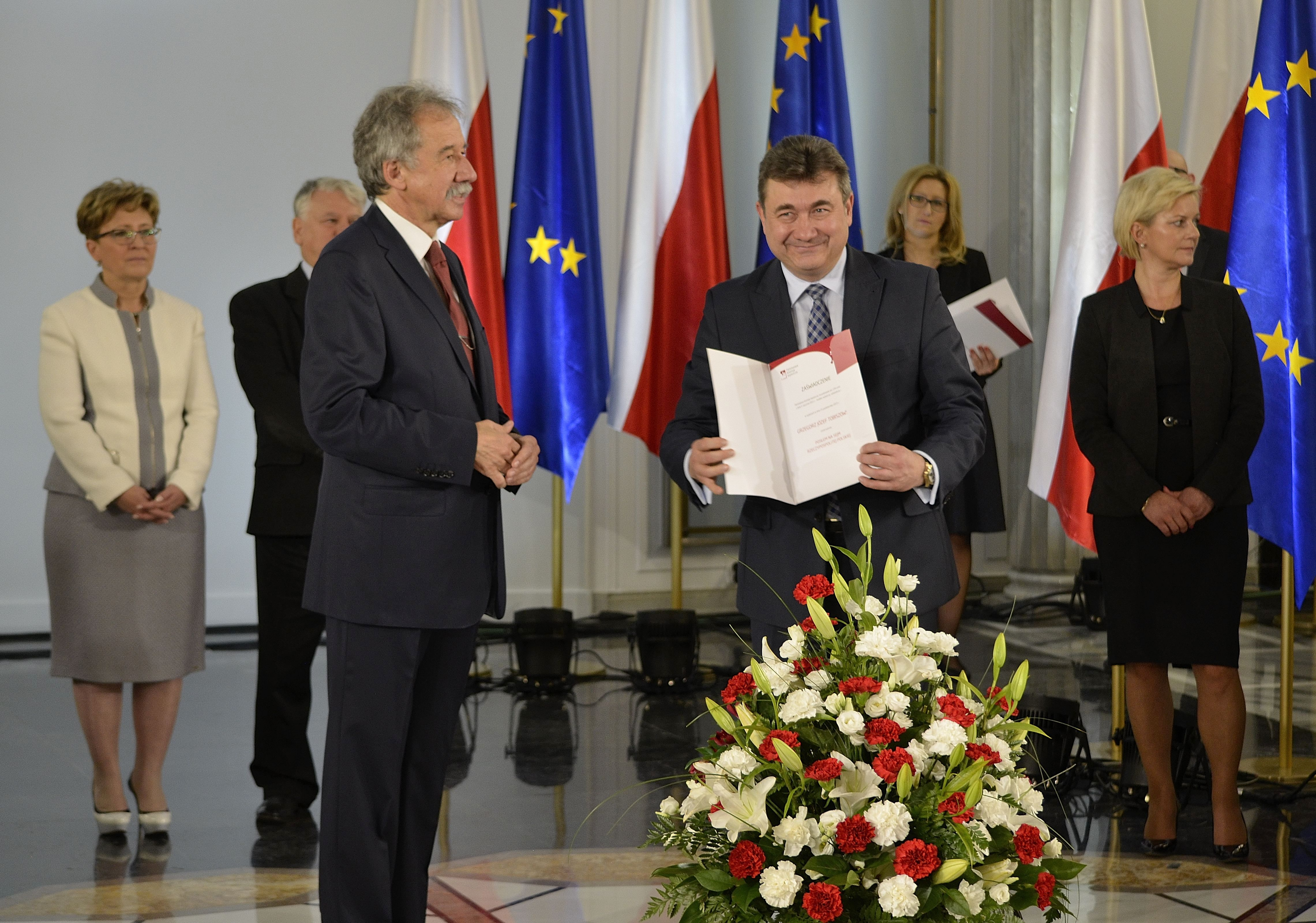 Poseł Grzegorz Tobiszowski podczas uroczystości wręczenia zaświadczeń o wyborze nowo wybranym posłom w Sali Kolumnowej Sejmu